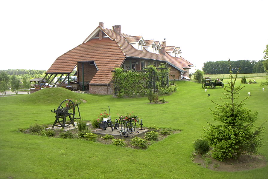 Restauracja "Petrico" w Krzywopłotach autor zdjęcia Kluka; 02.02.2000r.